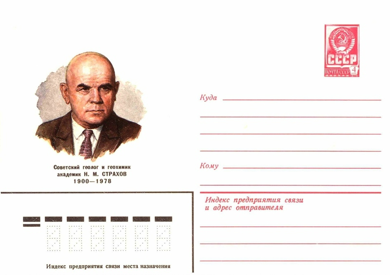 Художественные маркированные конверты 1980 года.